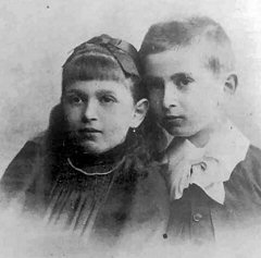 he:אוטו באואר ואחותו אידה ("דורה"), בשנת 1889